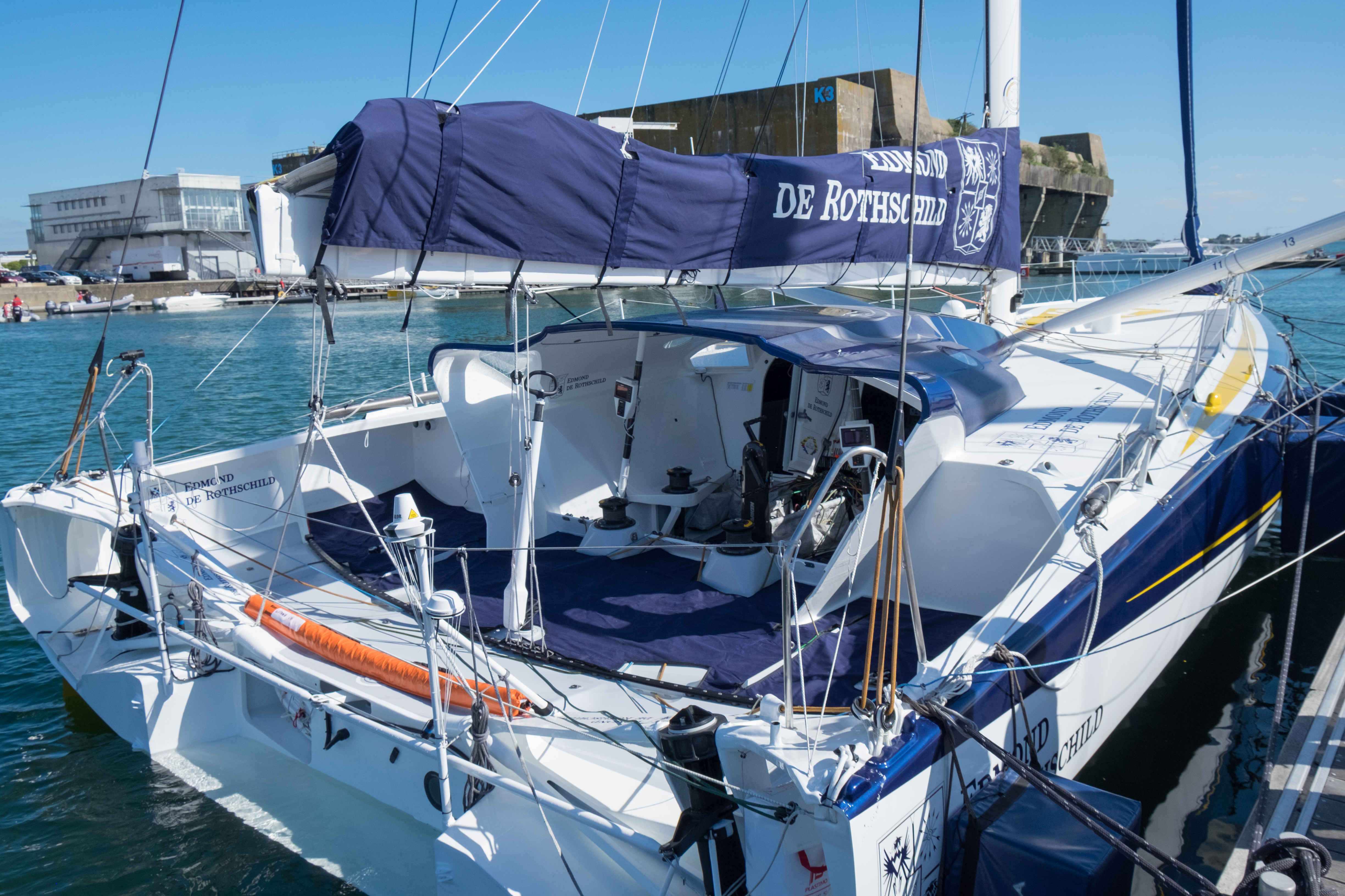 Le cockpit du 60 pieds IMOCA Gitana 16, skippé par Sébastien Josse.